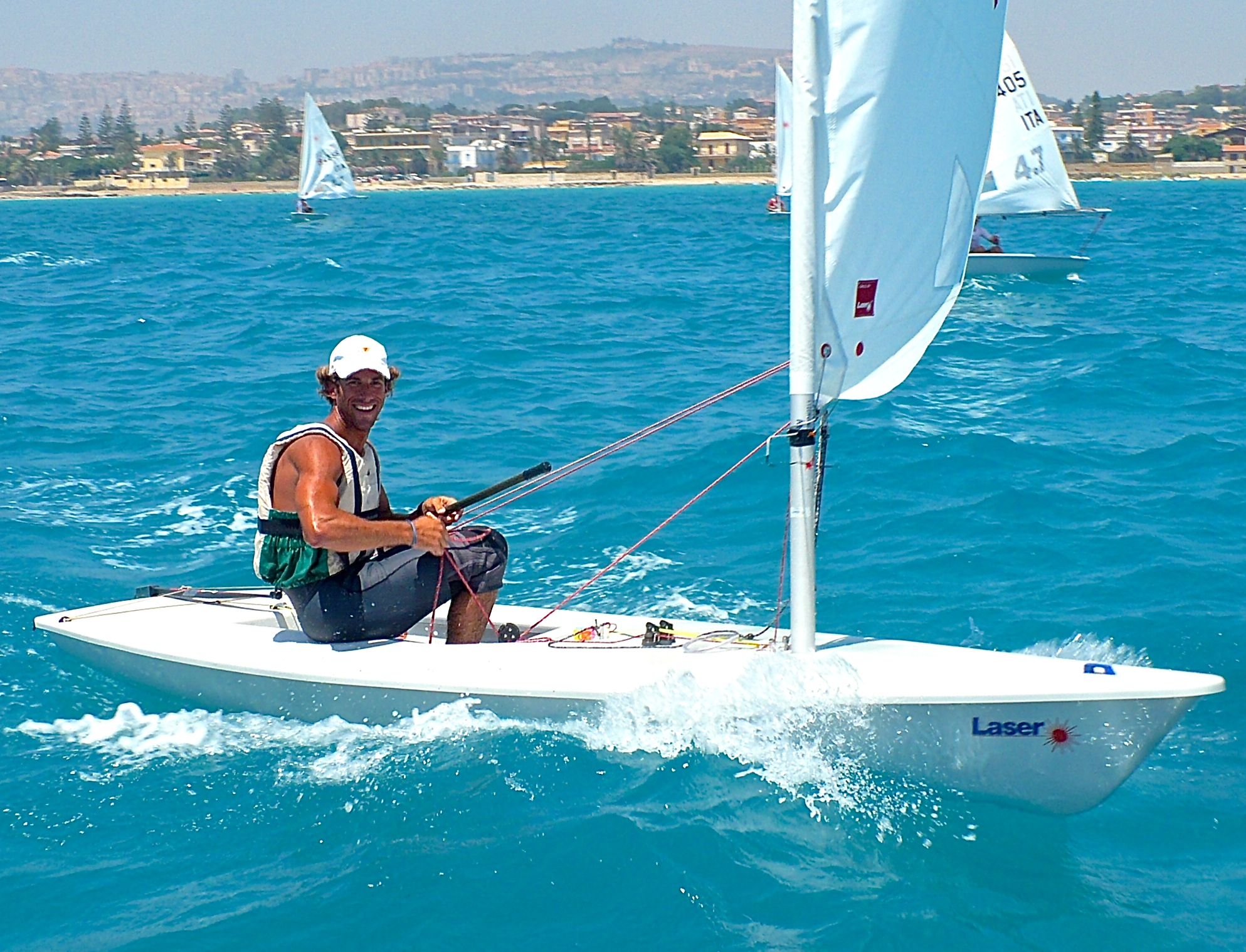 Laser